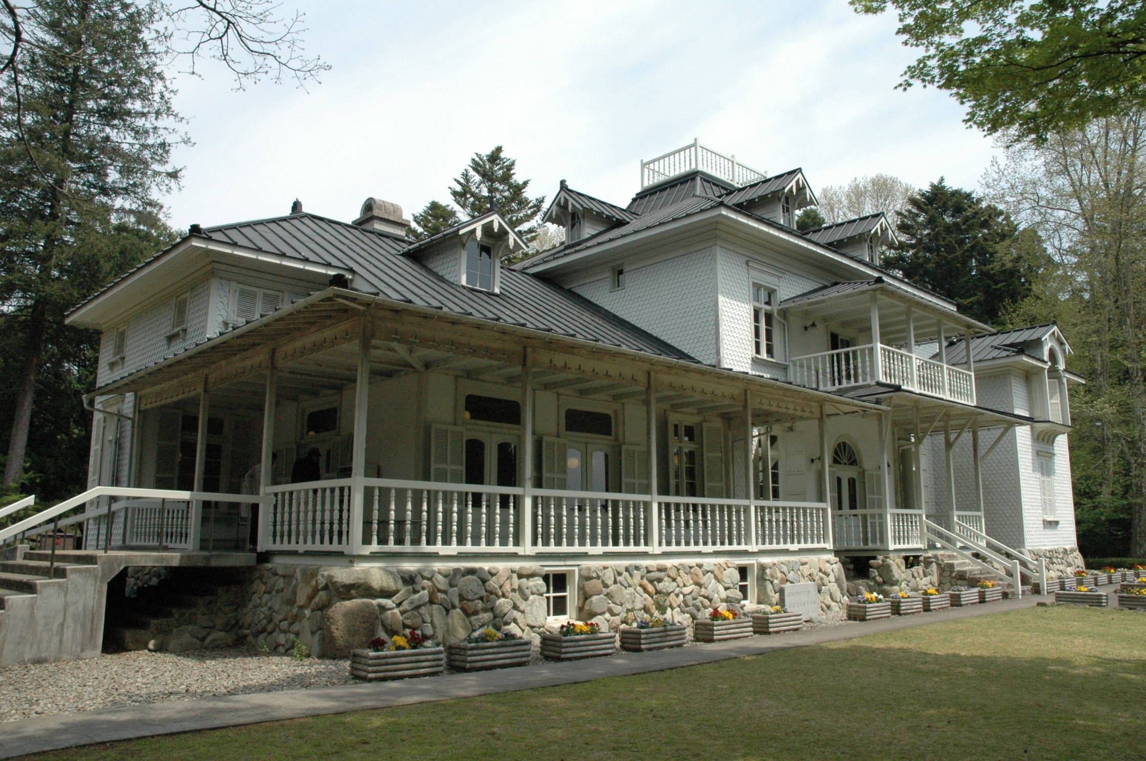 旧青木周蔵那須別邸(栃木県那須塩原市、重要文化財、1888年竣工)